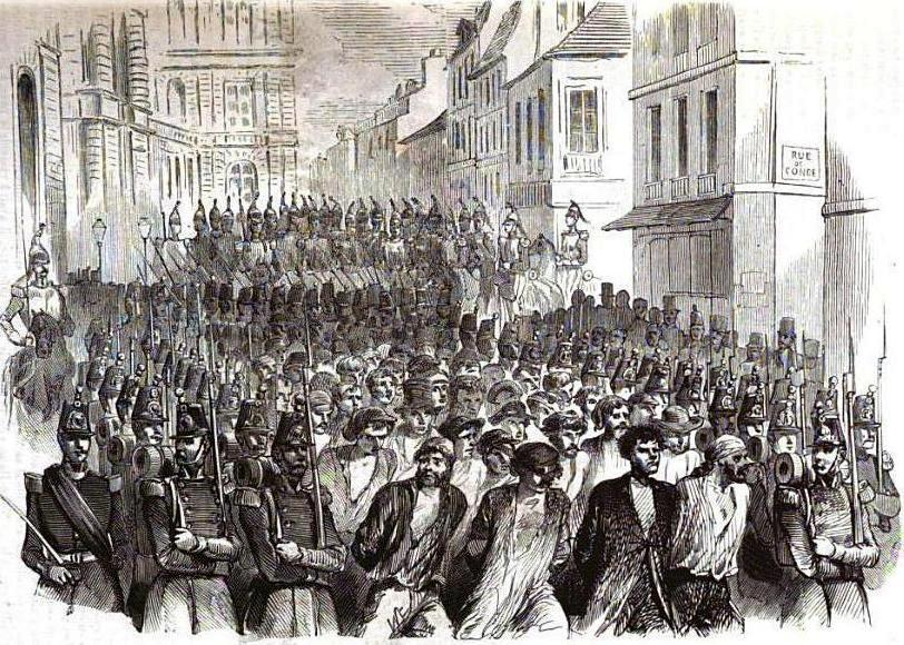 Insurgés faits prisonniers lors de la répression des Journées de Juin à Paris (1848).